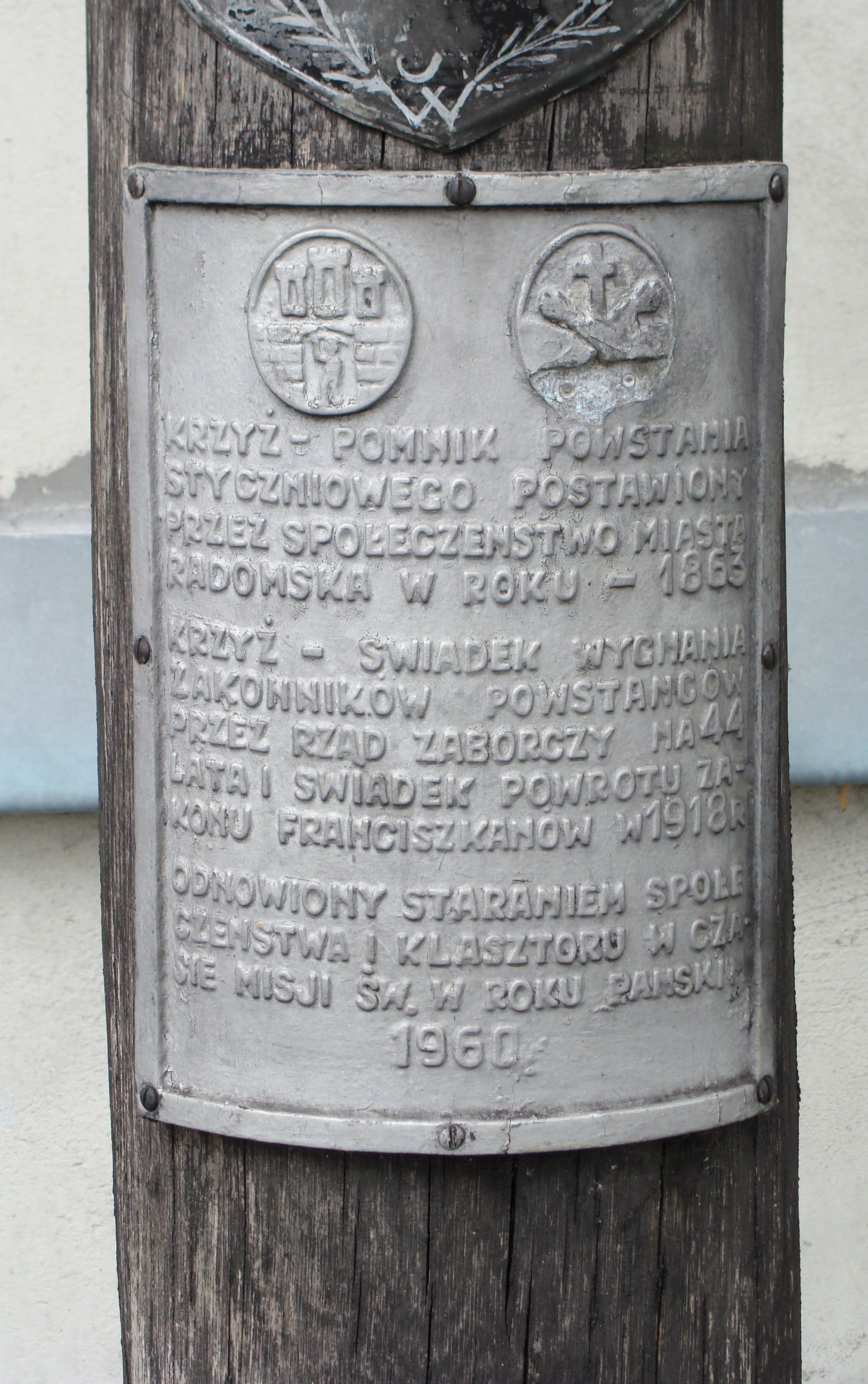 Tablica upamiętniająca represje carskie po powstaniu styczniowym 1863 r. - wypędzenie zakonników z klasztoru Franciszkanów w Radomsku